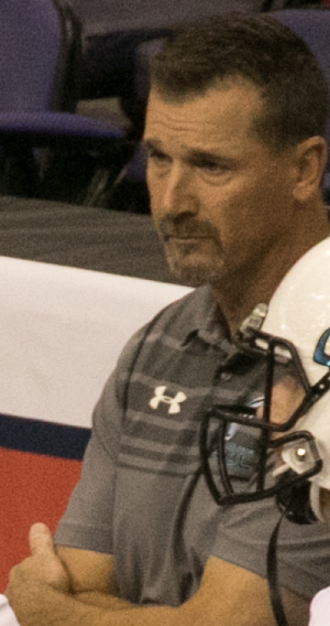 Valor 47 / Philadelphia Soul 48